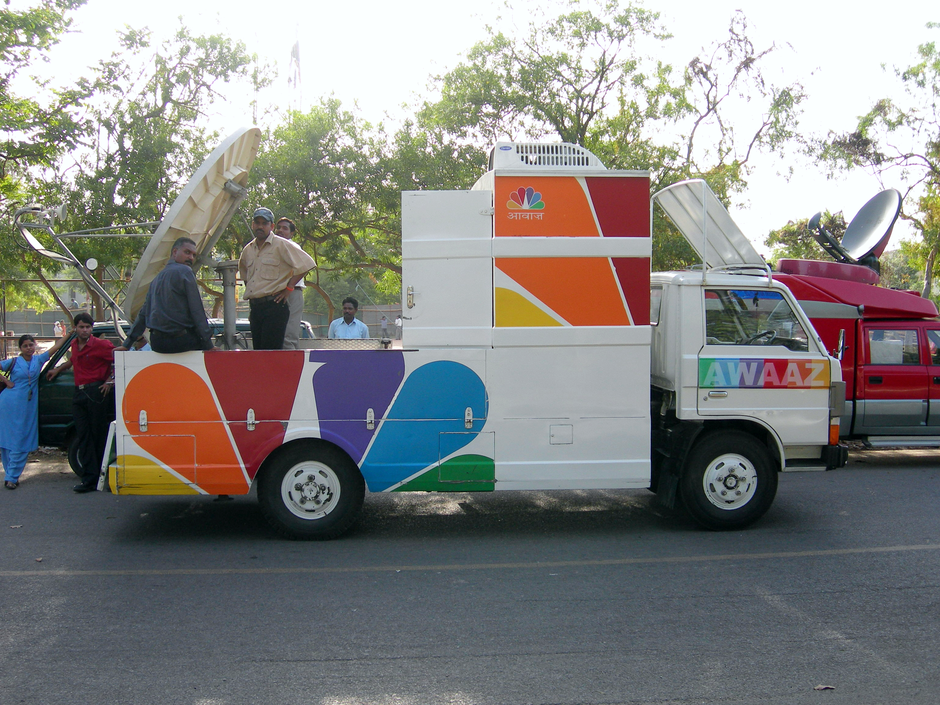 CNBC Awaaz News VanCNBC news van